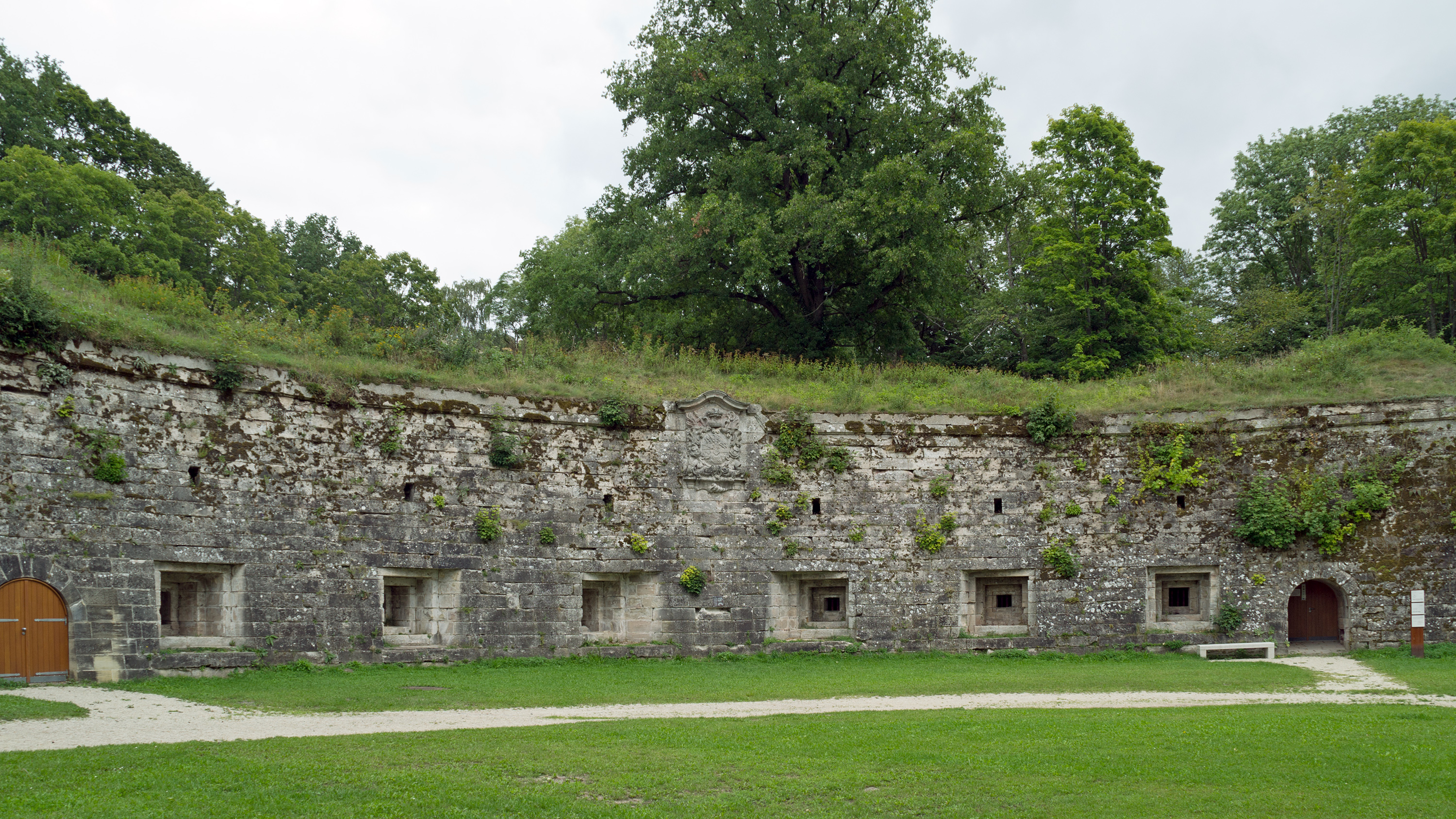 Die Contregarde Carl, eines der vier nördlichen Vorwerke der Festung Rosenberg in Kronach. Das Bild zeigt die zur Festung gewandte Seite der Kontergarde, die kasemattiert und mit sechs Schießscharten für Kanonen ausgestattet ist.